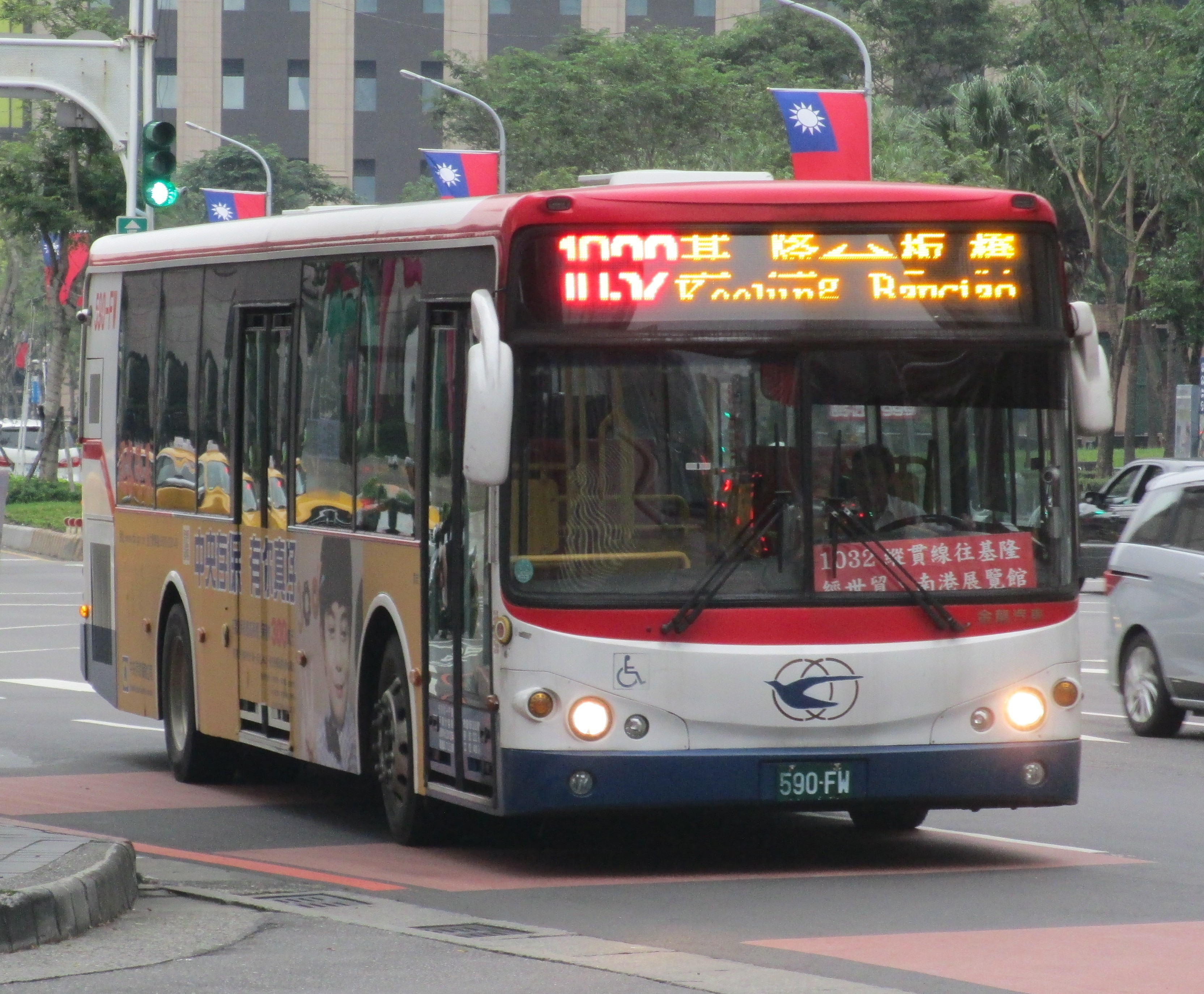 基隆客運 2012 KINGLONG KL6112U1 590-FW 1032